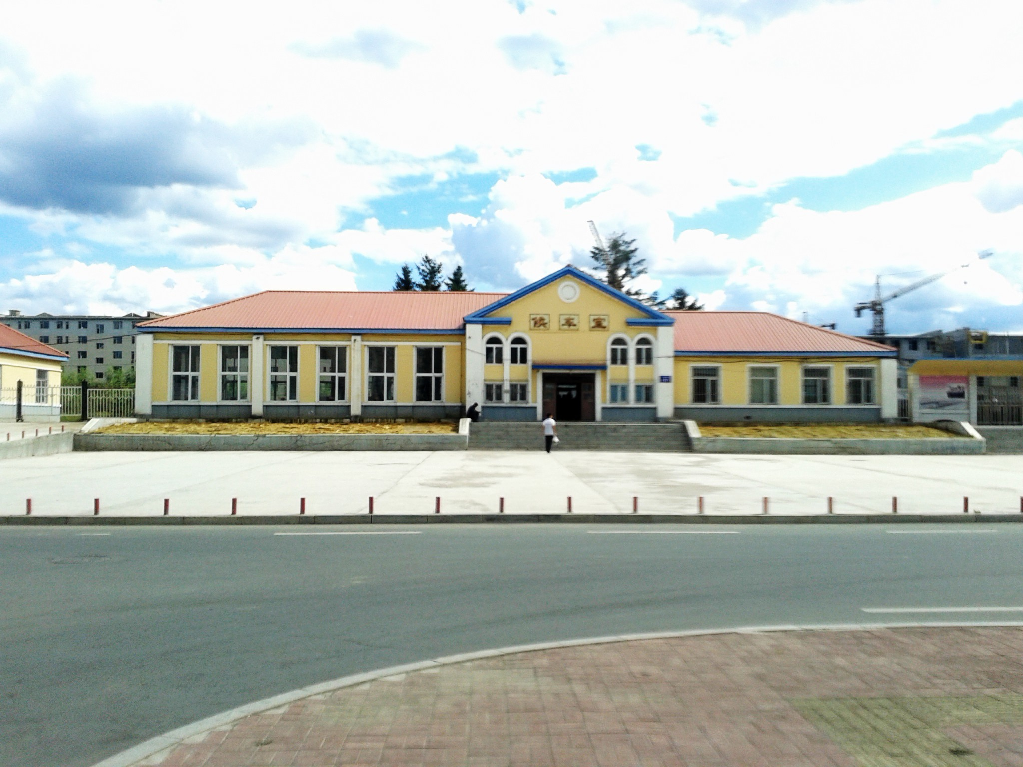 口前站候车室